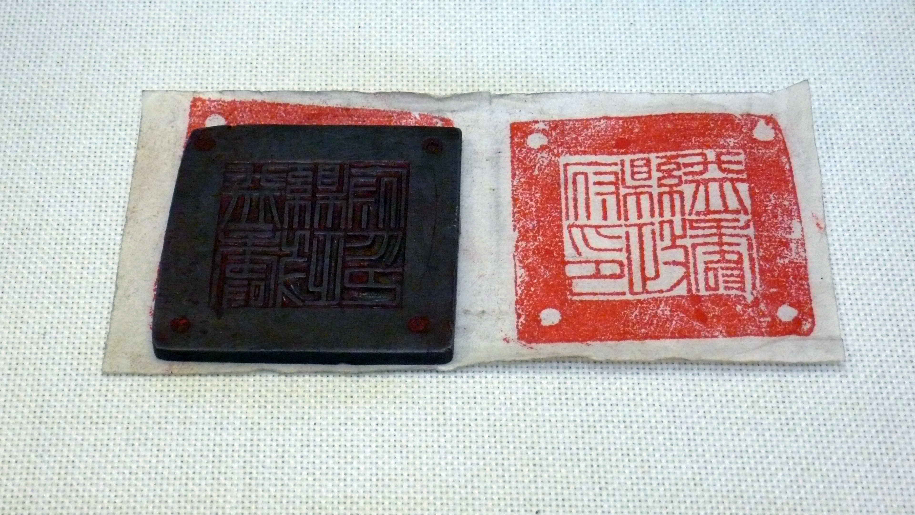 中文（中国大陆）: 益寿县政府印。青州博物馆藏。